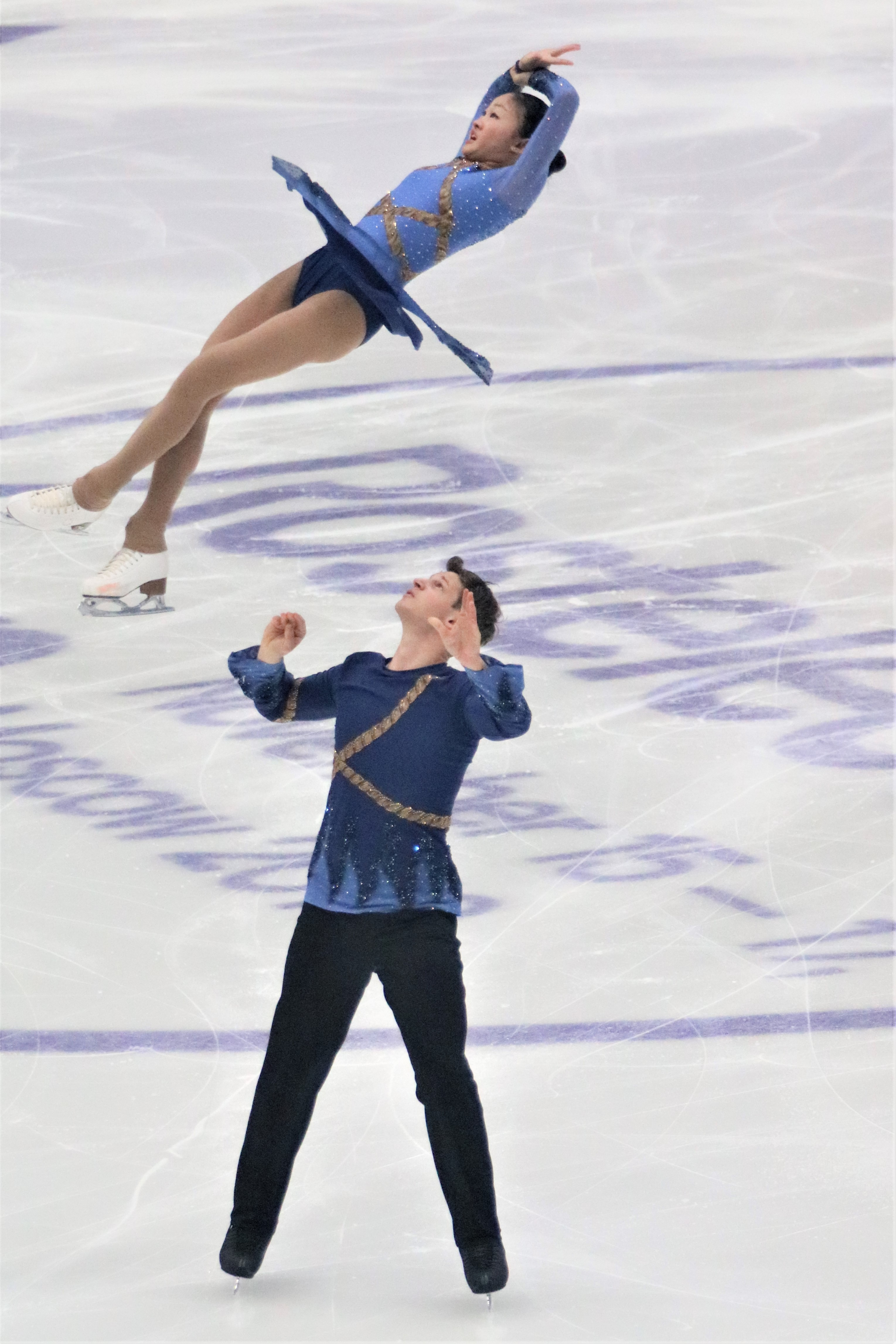 Одри Лу / Миша Митрофанов (США) на Rostelecom Cup 2019